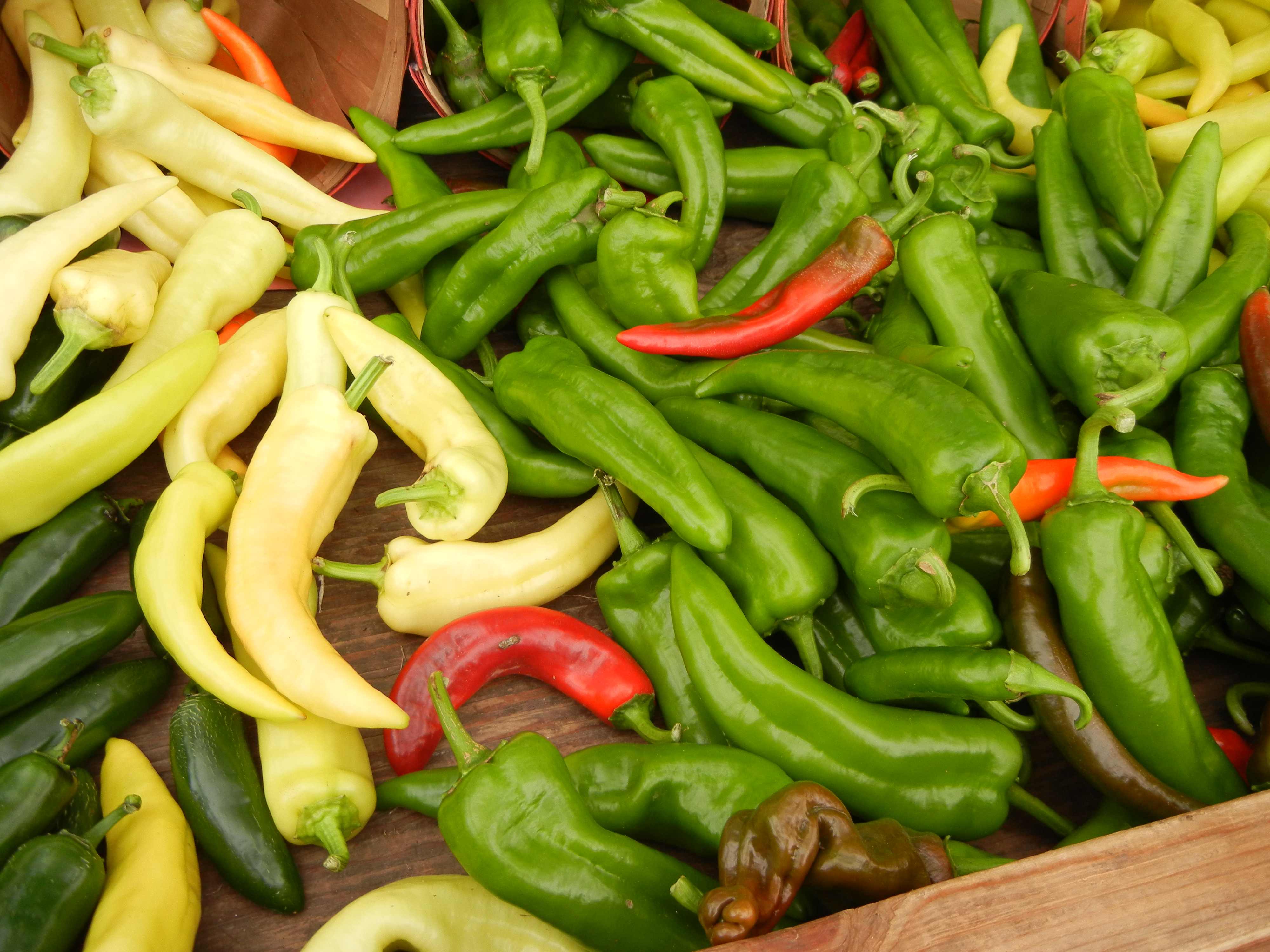 Anaheim chili peppers